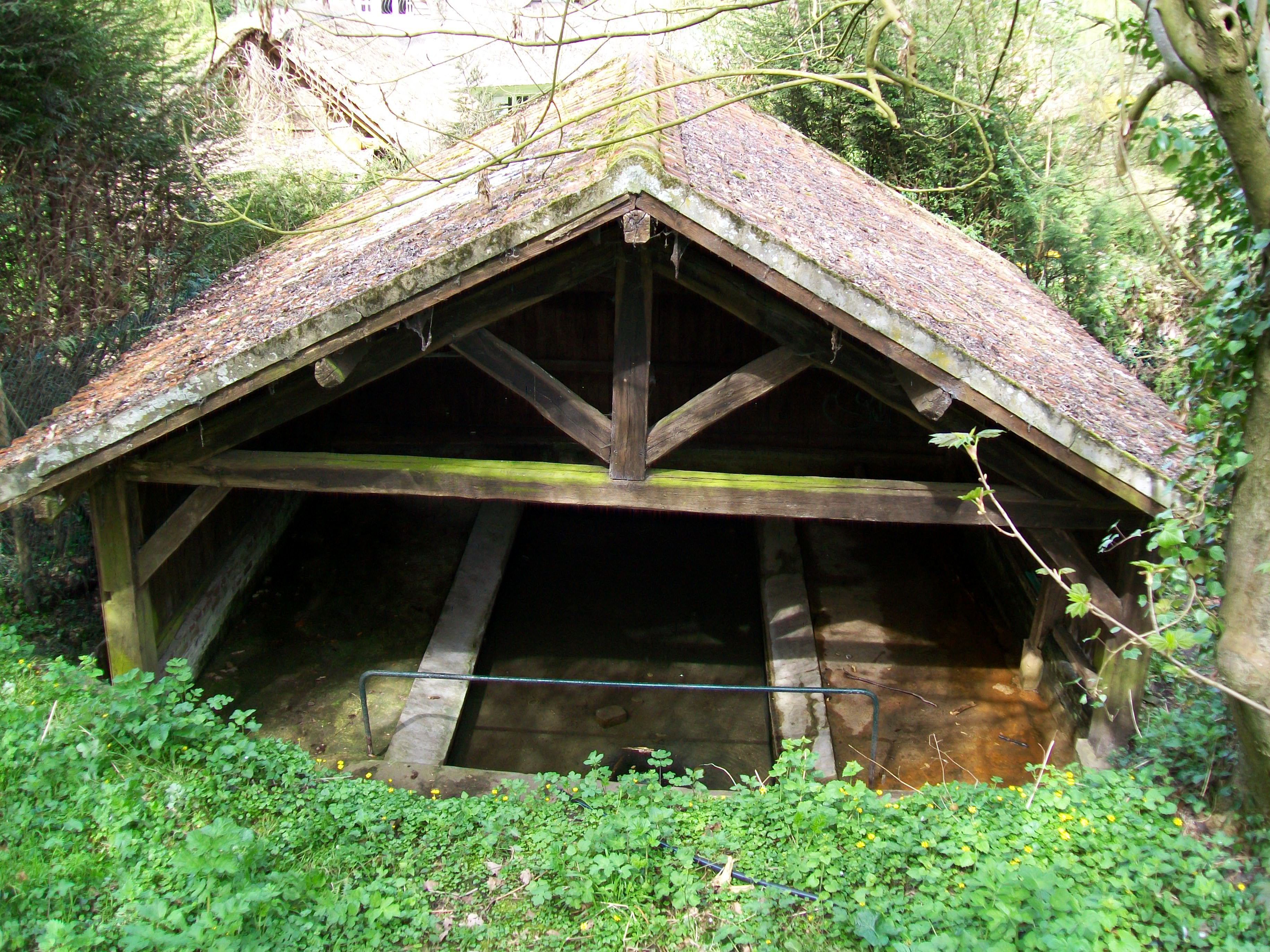 Le lavoir, situé dans un bois au nord du village. La source qui l'alimente se trouve sous la pente au premier plan, dans un local souterrain maçonné en pierres de taille, avec, en son centre, une petite margelle voûtée.